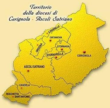 territorio della diocesi di Cerignola-Ascoli Satriano diviso tra i comuni che ne fanno parte